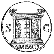 monnaie de Néron montrant l'autel de la paix d'Auguste. Référence Cohen C27